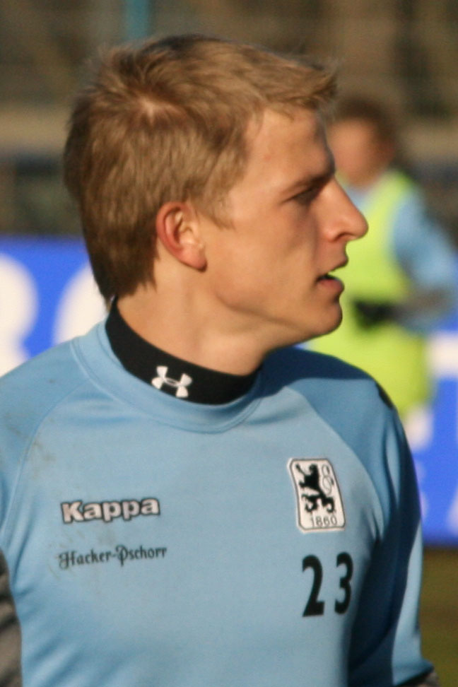 Nicky Adler, player of TSV 1860 München, training, 20.01.2007, Grünwalder Str., Munich